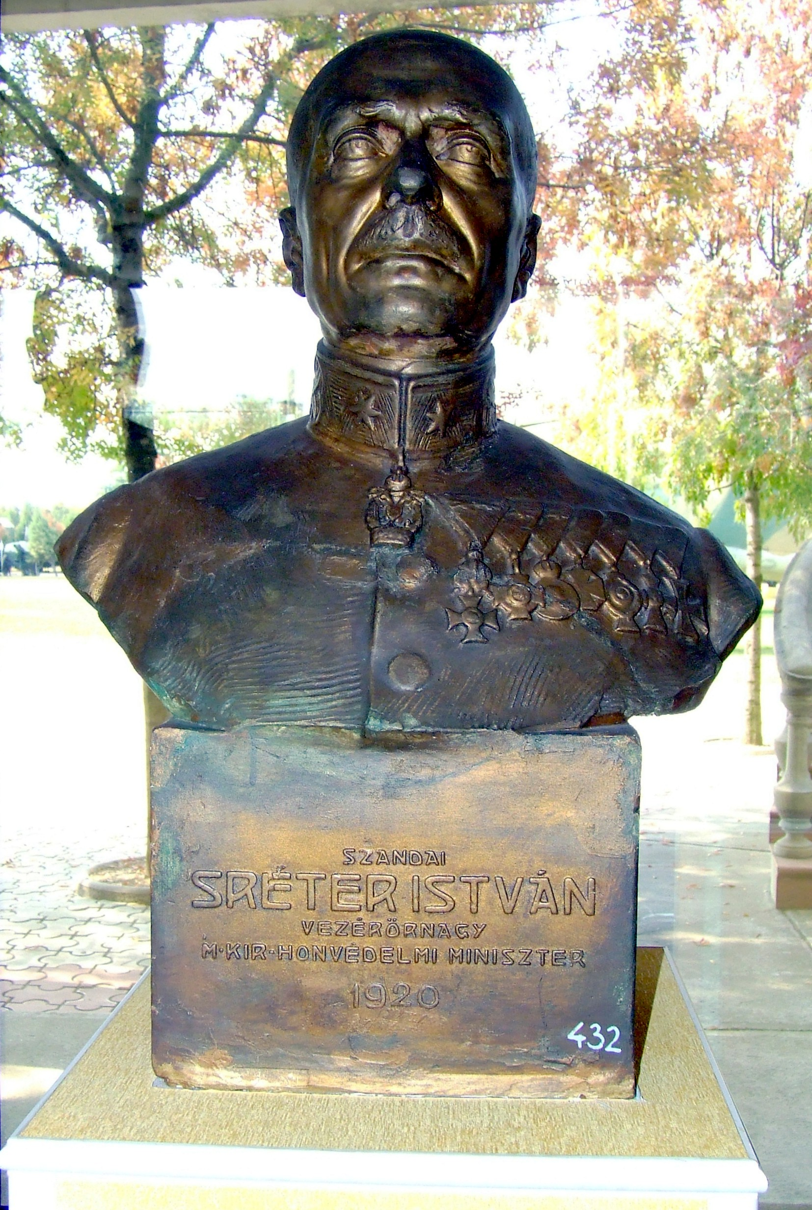 Sréter István (1867–1942) tábornok, honvédelmi miniszter mellszobra a keceli haditechnikai parkban